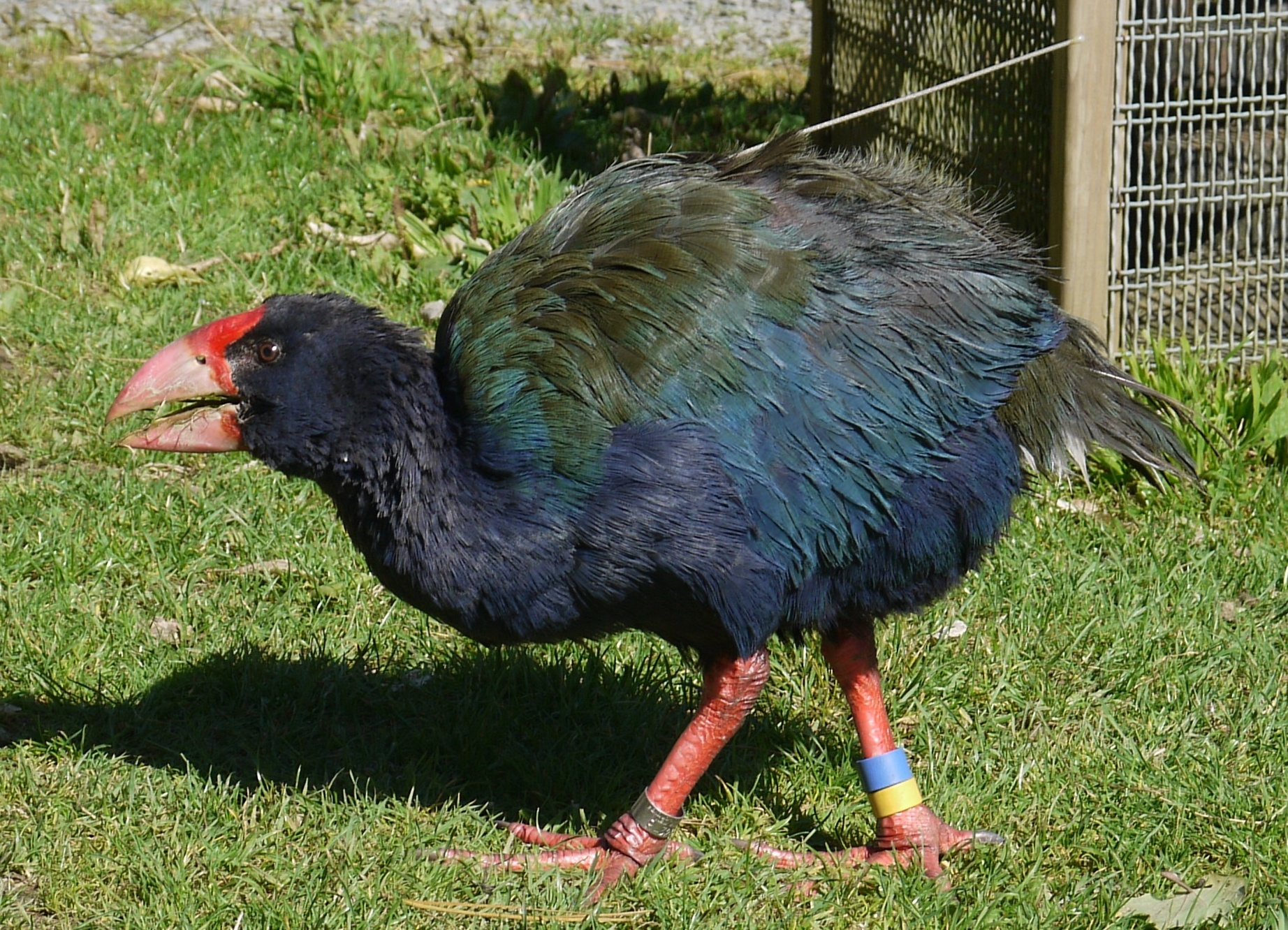 Takahe in Zealandia in Wellington